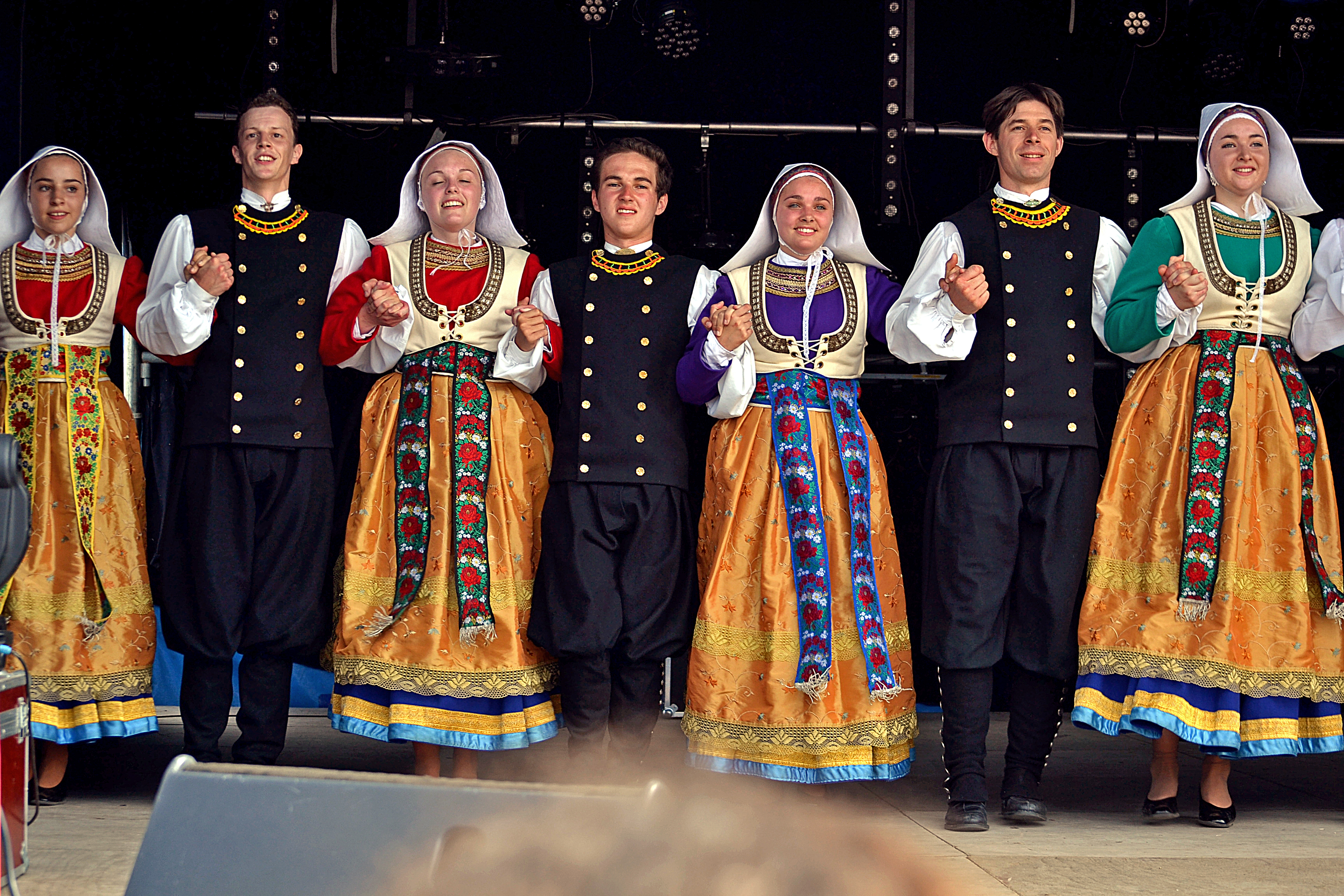 Bleuniadur au festival Gouel an Eost le 9 août 2015.